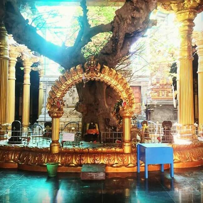 புனர்நிர்மானத்தின்பின் மருதம ரத்துப்பிள்ளையார்